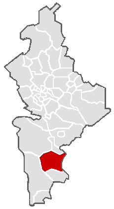 Ubicación geográfica del municipio de Aramberri en el estado mexicano de Nuevo León.